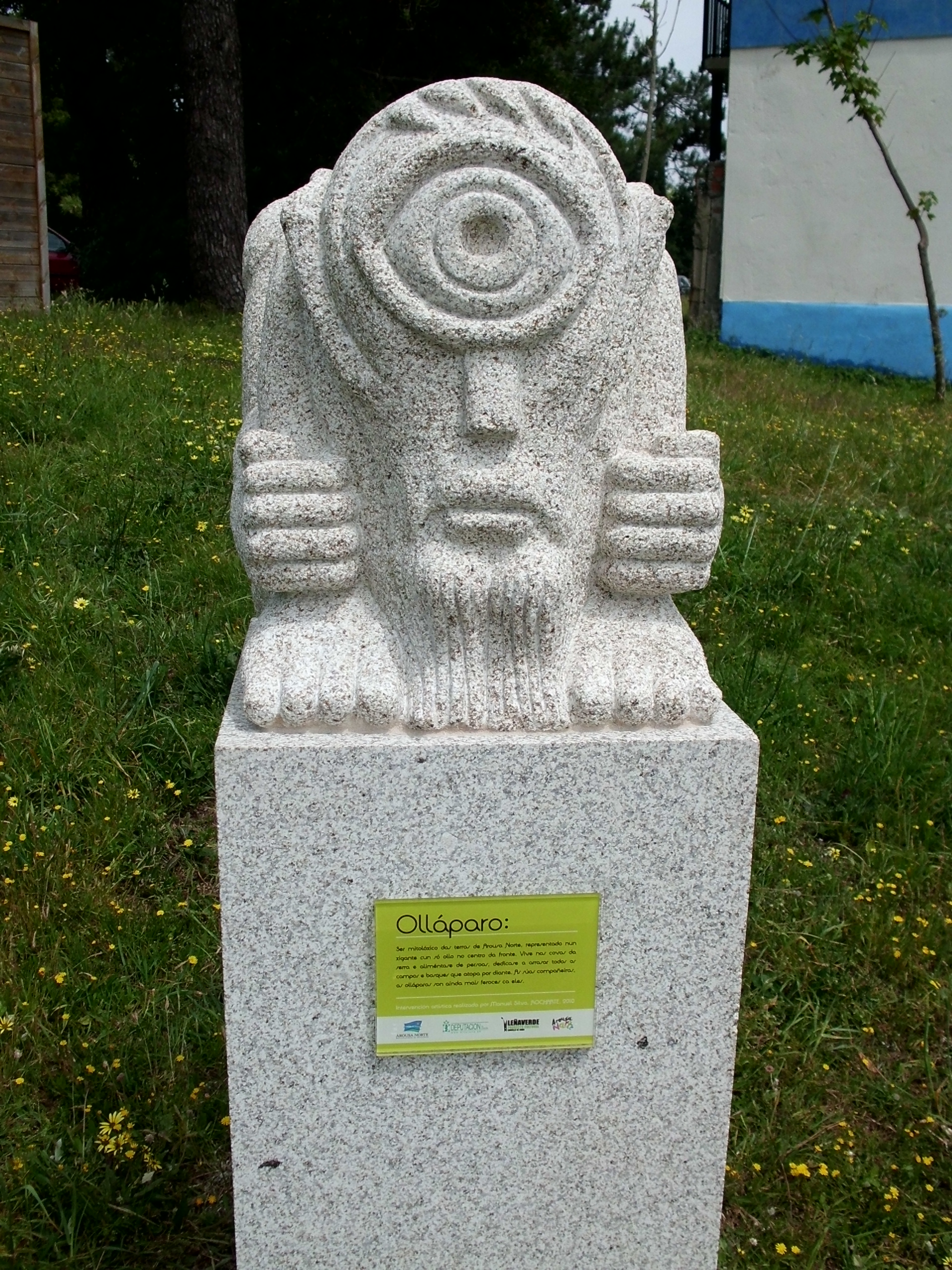 Escultura dun olláparo en Boiro, no paseo de Barraña. Escultura de Manuel Silva Piñeiro.